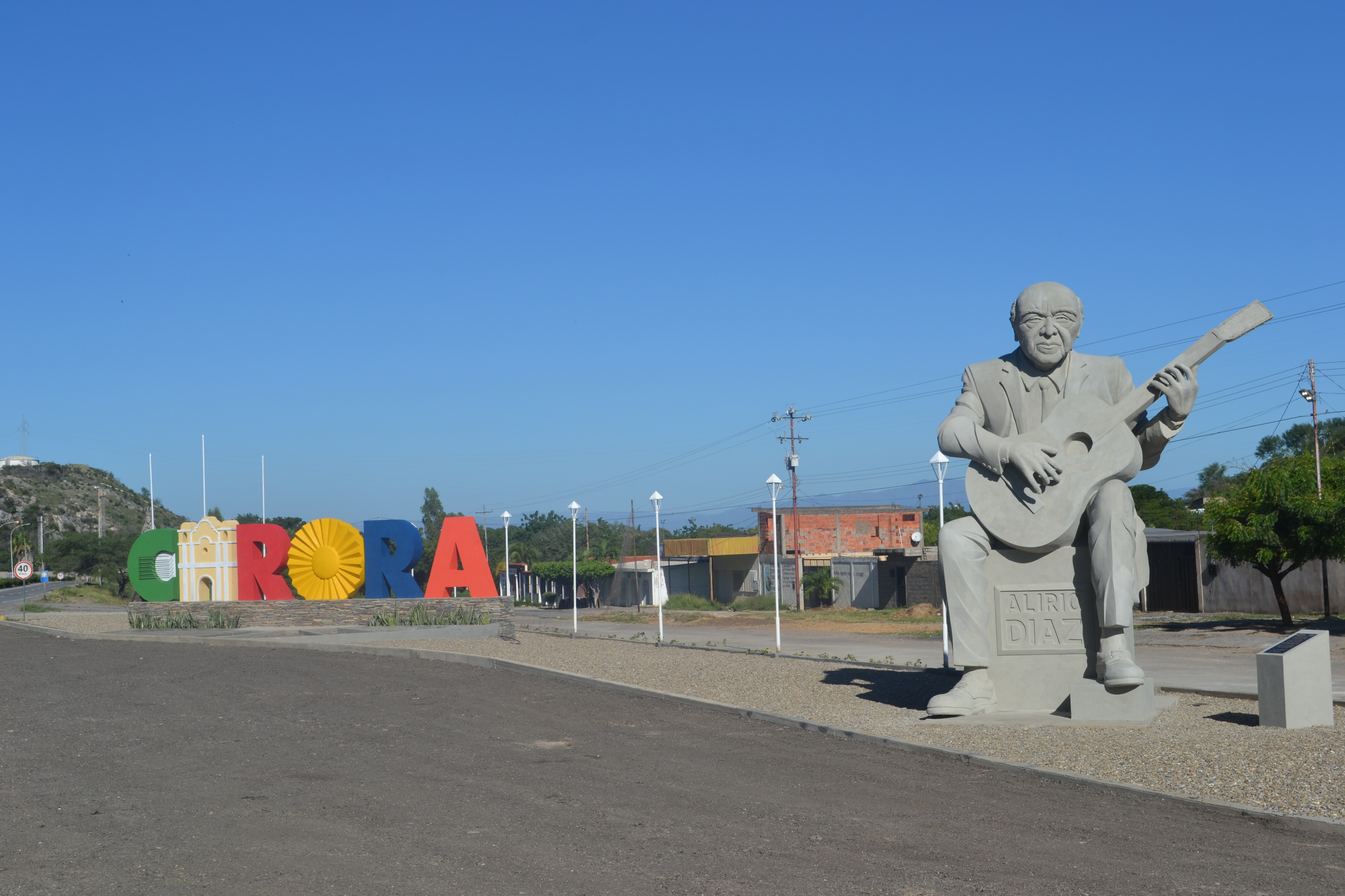 Monumento erigido a la entrada de Carora, estado Lara, Venezuela, en honor del maestro de la guitarra Alirio Diaz